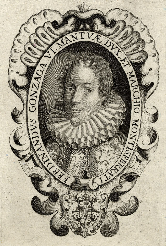 Portrait aus einer Serie von Gonzaga-Portraits, Kupferstich, 17. Jh.; Ferdinando VI.